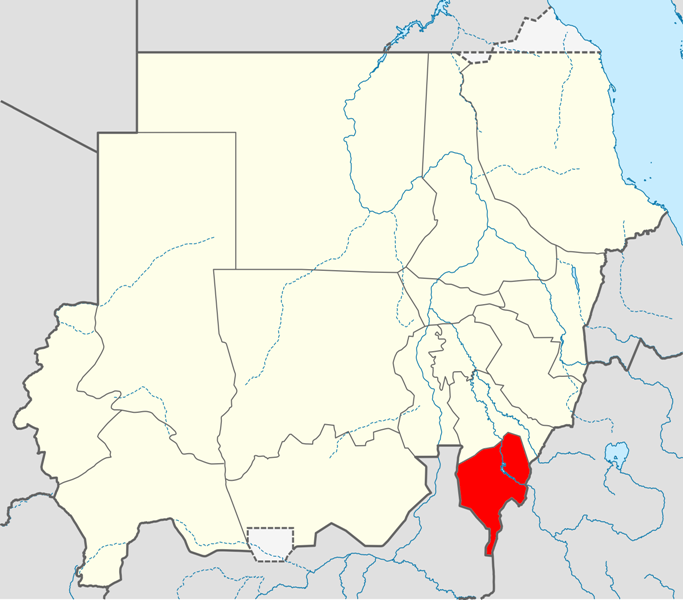 Locator map